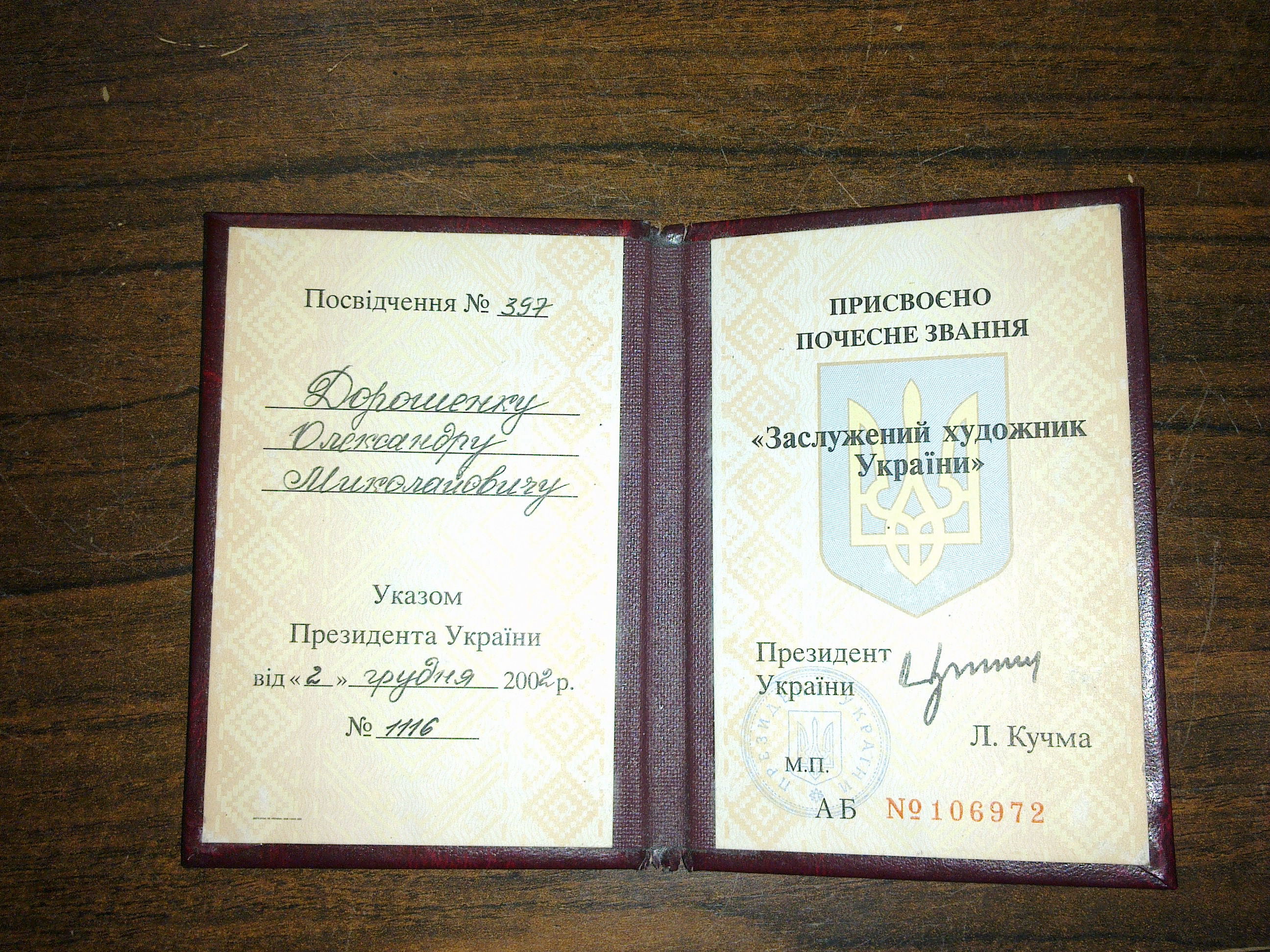 Посвідчення Заслуженого художника України